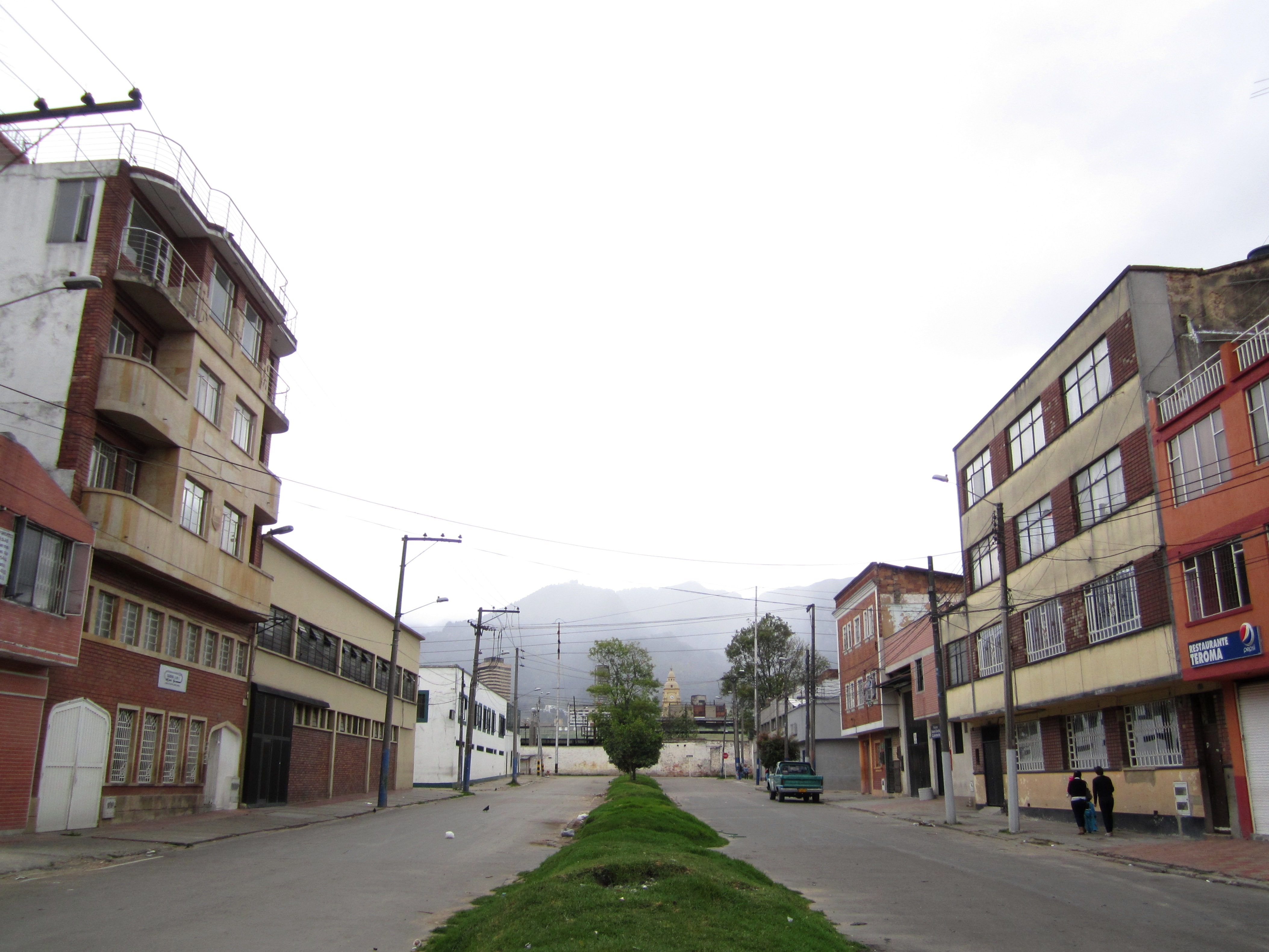 Barrio El Listón Bogotá calle 16 con carrera 20. Localidad de Los Mártires. Al fondo, detrás del muro blanco, se encuentra la Estación de La Sabana.